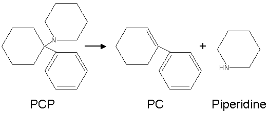 By Magnus Manske 11:40, 27 August 2002 Magnus Manske 522x221 (2,175 bytes) (from meta)